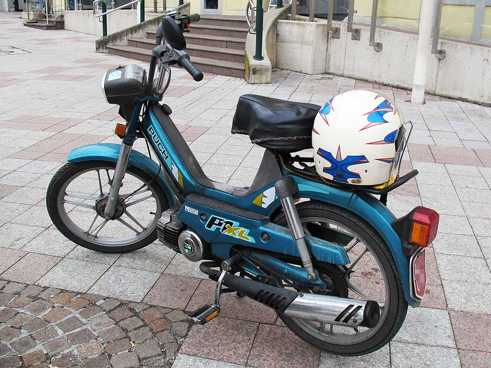 Puch-Maxi XL P1 aus den 1990er-Jahren, Alltagsfund in den Straßen von Gleisdorf